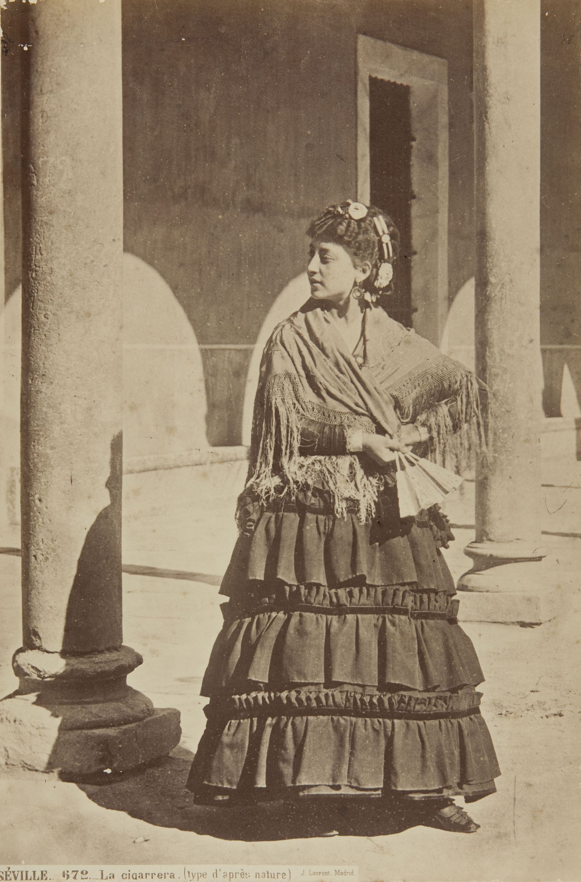 Cigarrera del siglo XIX en la Real Fábrica de Tabacos de Sevilla / La cigarrera (type d'après nature) (33,6 x 23cm Albúmina sobre papel)